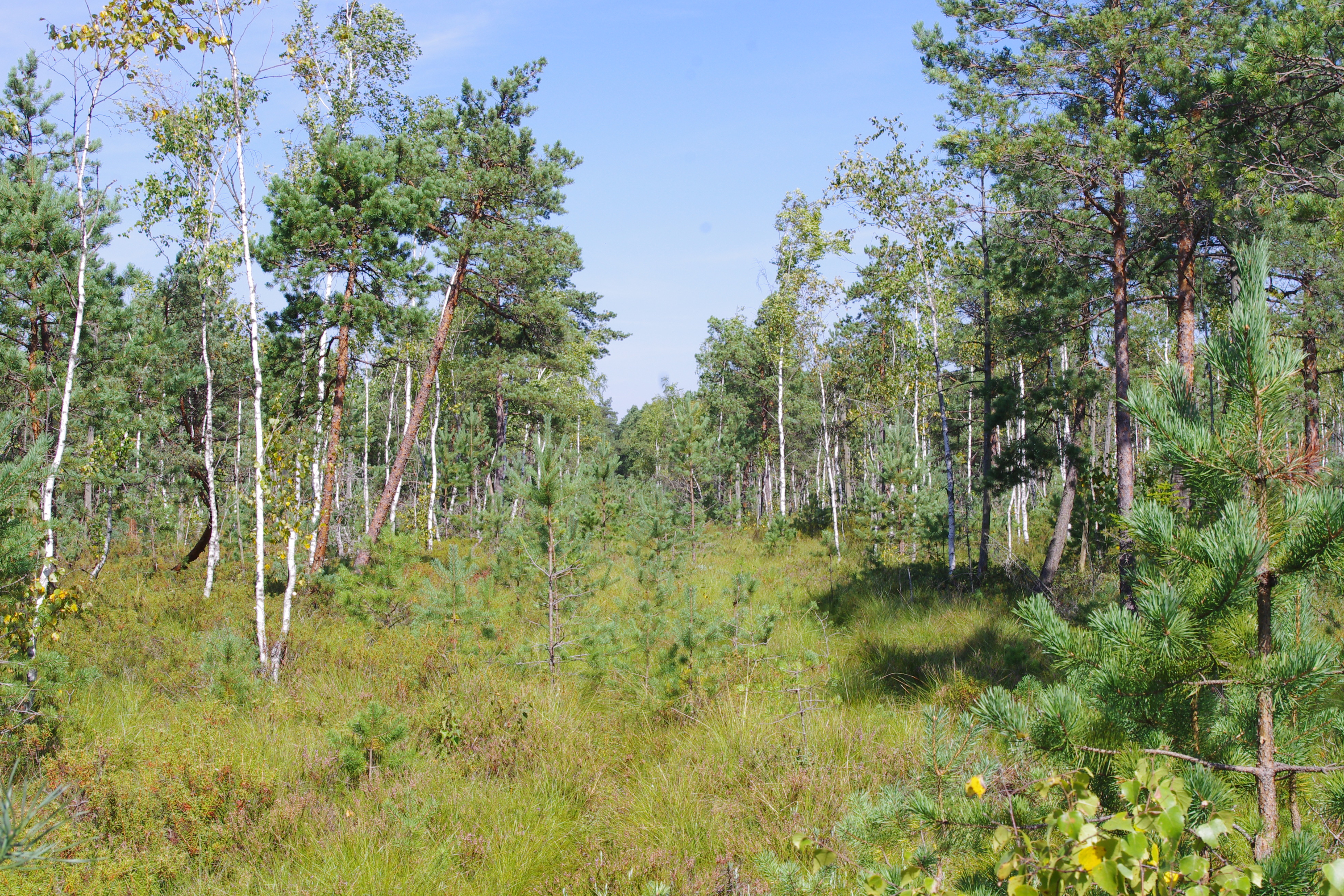 Lygiaraistis